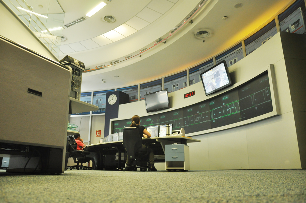 Vista do Centro de Controle Operacional do Metrô de Porto Alegre (Trensurb), responsável por monitorar o funcionamento do sistema de metrô.